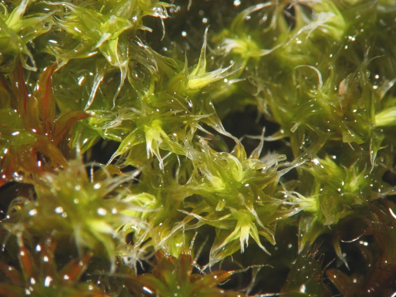 Verlängerte Zackenmütze (Racomitrium elongatum), feuchter Zustand